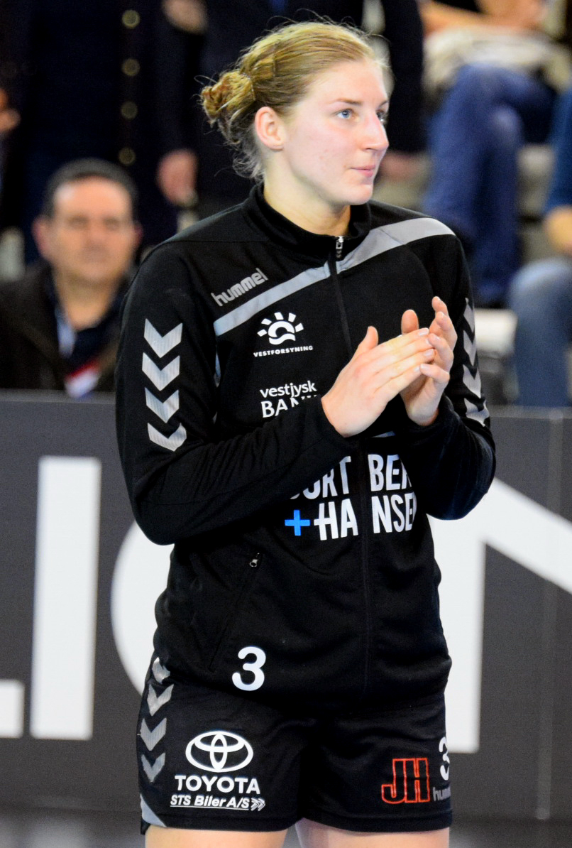 Linn Blohm Le 03 avril 2016 lors du match aller de demi-finale de la Coupe des vainqueurs de coupe de handball Issy Paris Hand / Team Tvis Holstebro